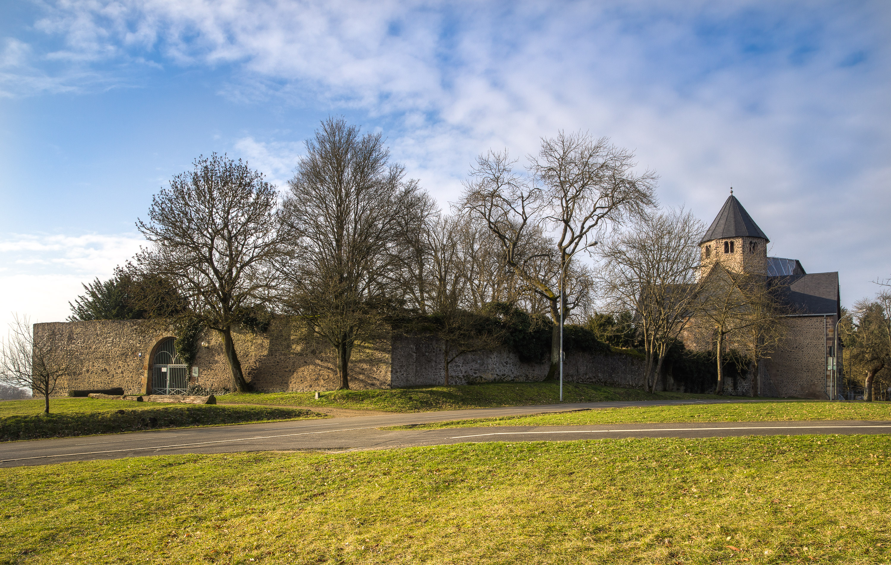 Kloster Schiffenberg, Landkreis Gießen in Hessen, Deutschland